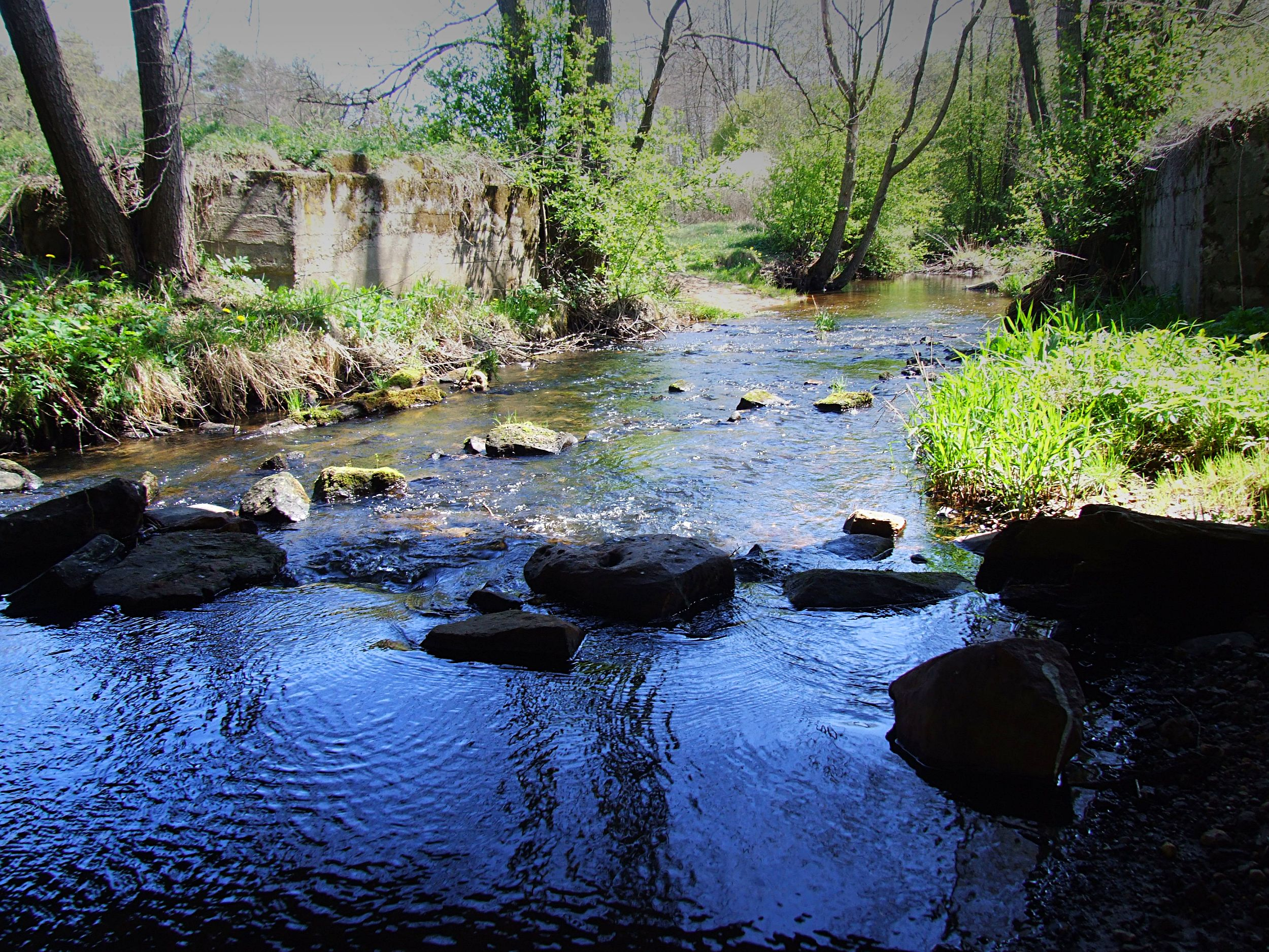 Michałów - rzeka Żarnówka